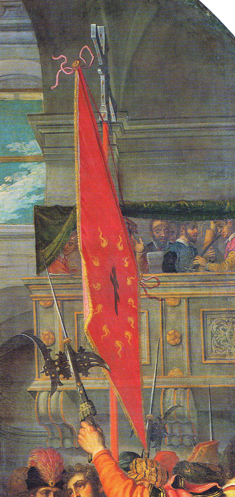 Donazione di Namo di Baviera (Antonio Gandino, Duomo vecchio, Brescia) dettaglio